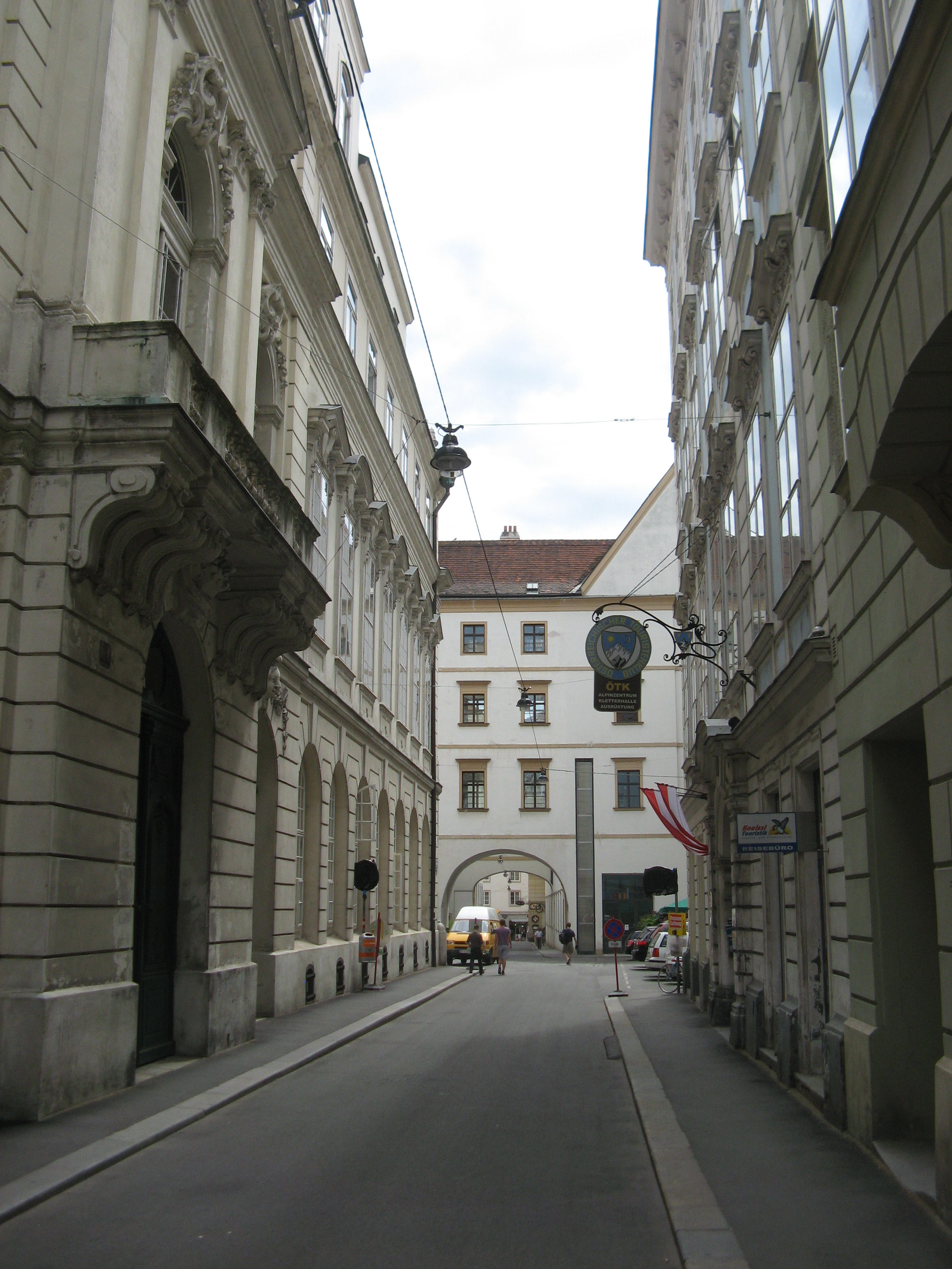 Bäckerstraße nach Osten, Wien-Innere Stadt